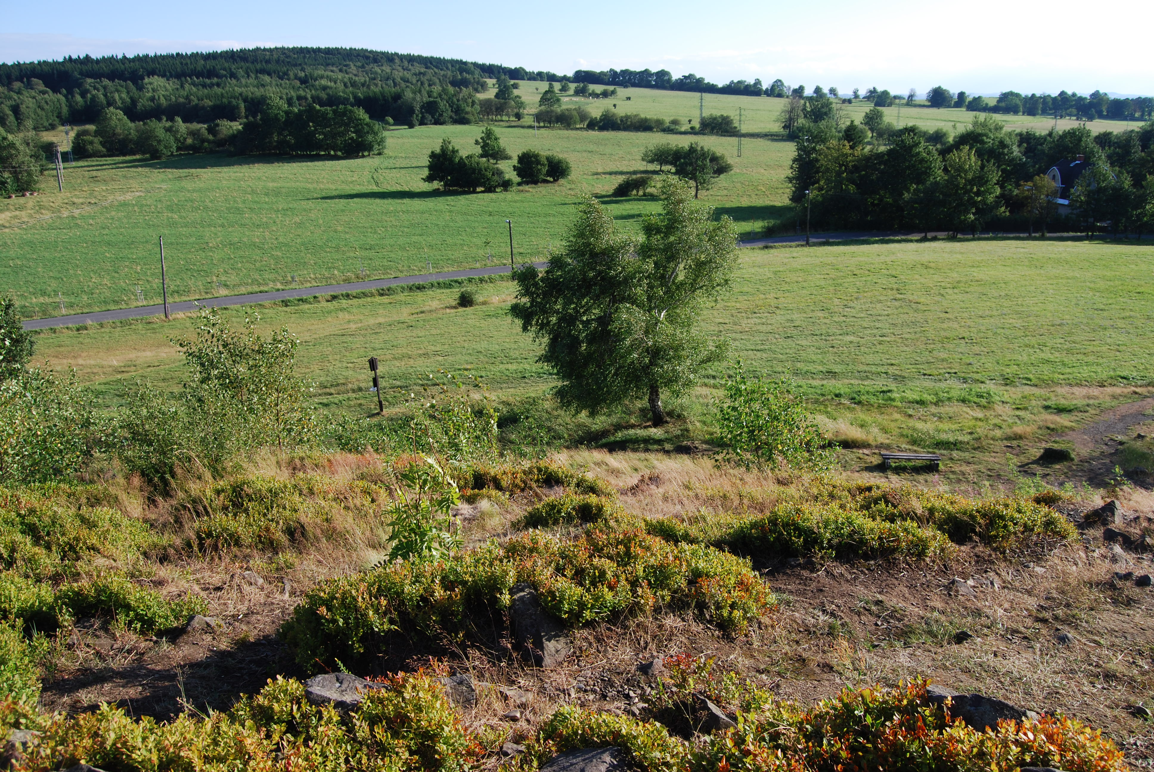 Česky: Pohled z Národní přírodní památky Panská skála na katastru obce Prácheň, součást města Kamenický Šenov v okrese Česká Lípa. Česká republika. - OpenStreetMap (Info)